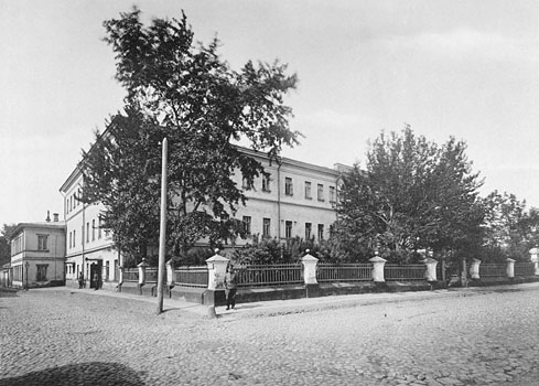 186. Канцелярiя Градоначальника въ ГнЪздниковскомъ пер. (Москва)